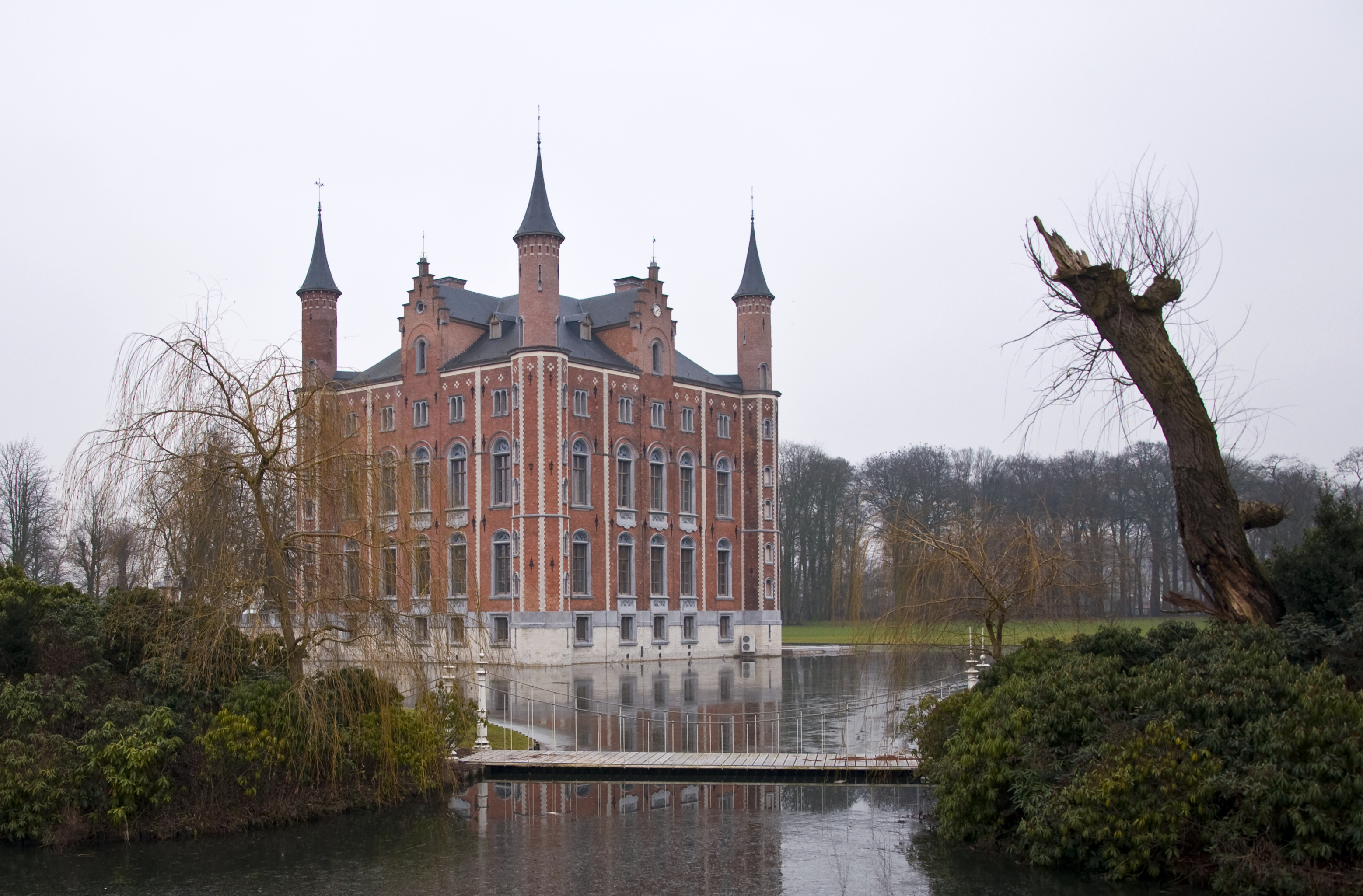 kasteel van Olsene, België